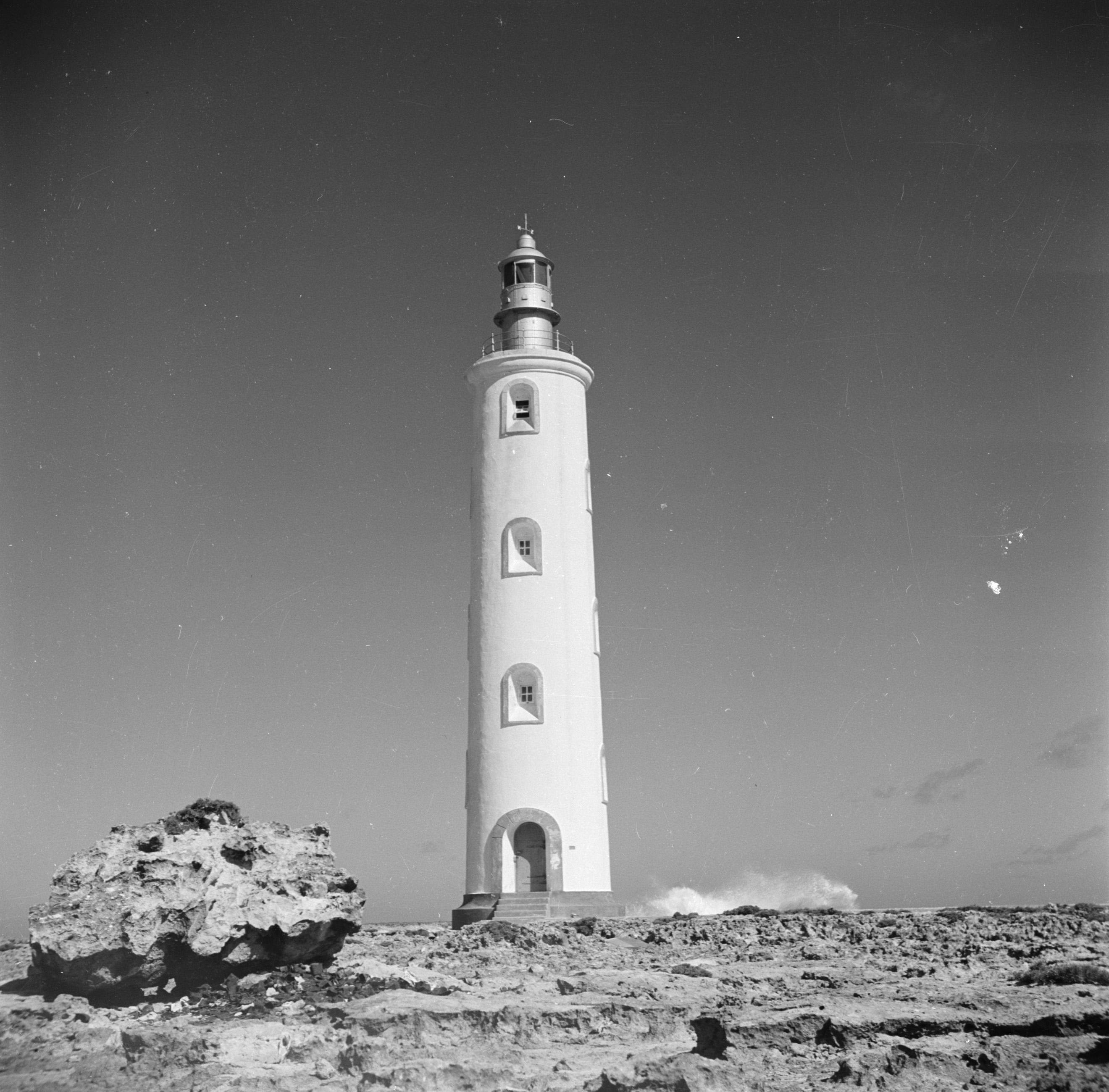 Collectie / Archief : Fotocollectie Van de Poll Reportage / Serie : Reis naar Suriname en de Nederlandse Antillen Beschrijving : De vuurtoren op de noordpunt van Bonaire Datum : 1947 Locatie : Bonaire, Nederlandse Antillen Trefwoorden : vuurtorens Fotograaf : Poll, Willem van de, [onbekend] Auteursrechthebbende : Nationaal Archief Materiaalsoort : Negatief (zwart/wit) Nummer archiefinventaris : bekijk toegang 2.24.14.02 Bestanddeelnummer : 252-8389